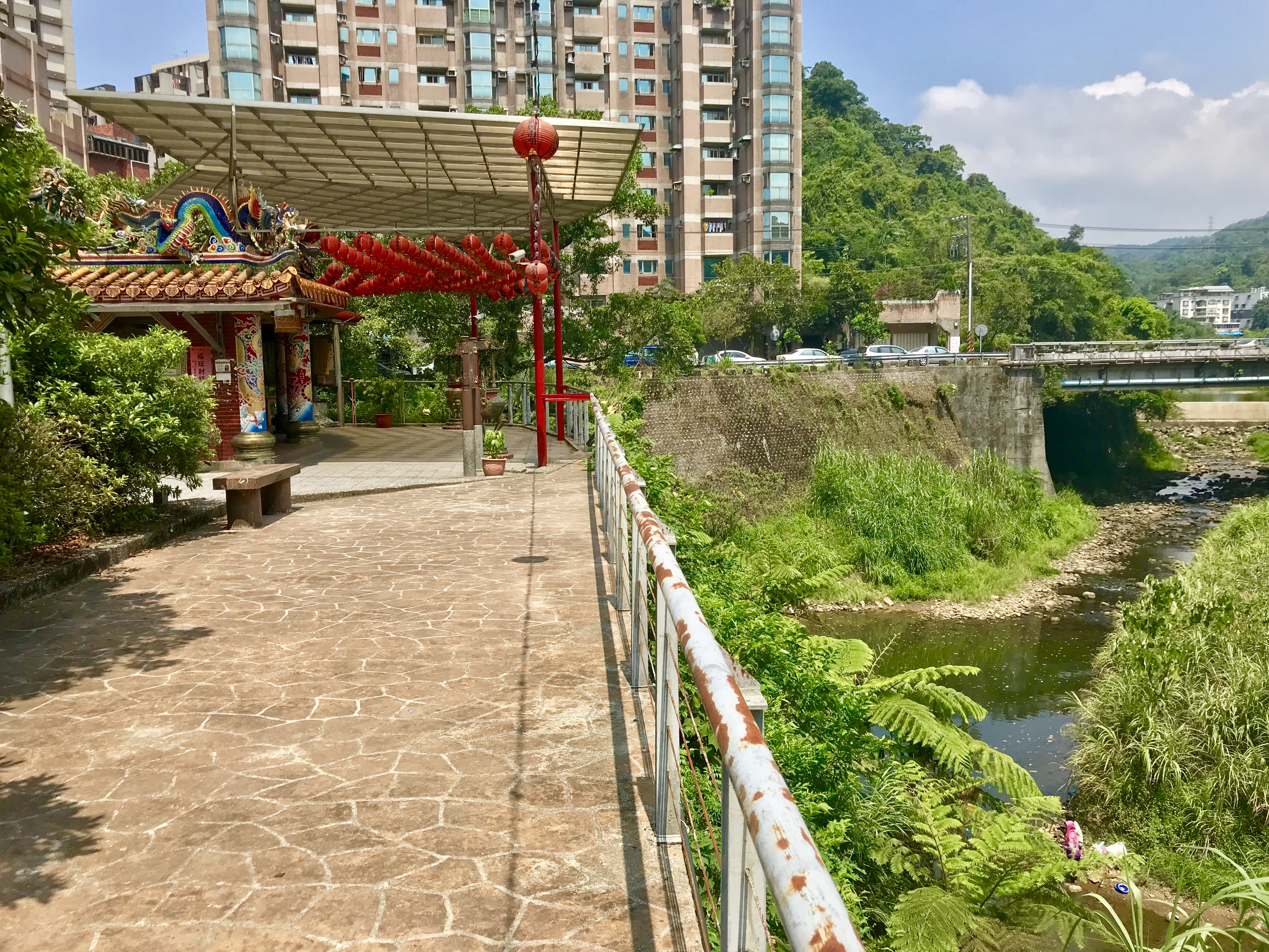 中文（台灣）: 暖暖雙生土地公廟與東勢溪和西勢溪匯流處